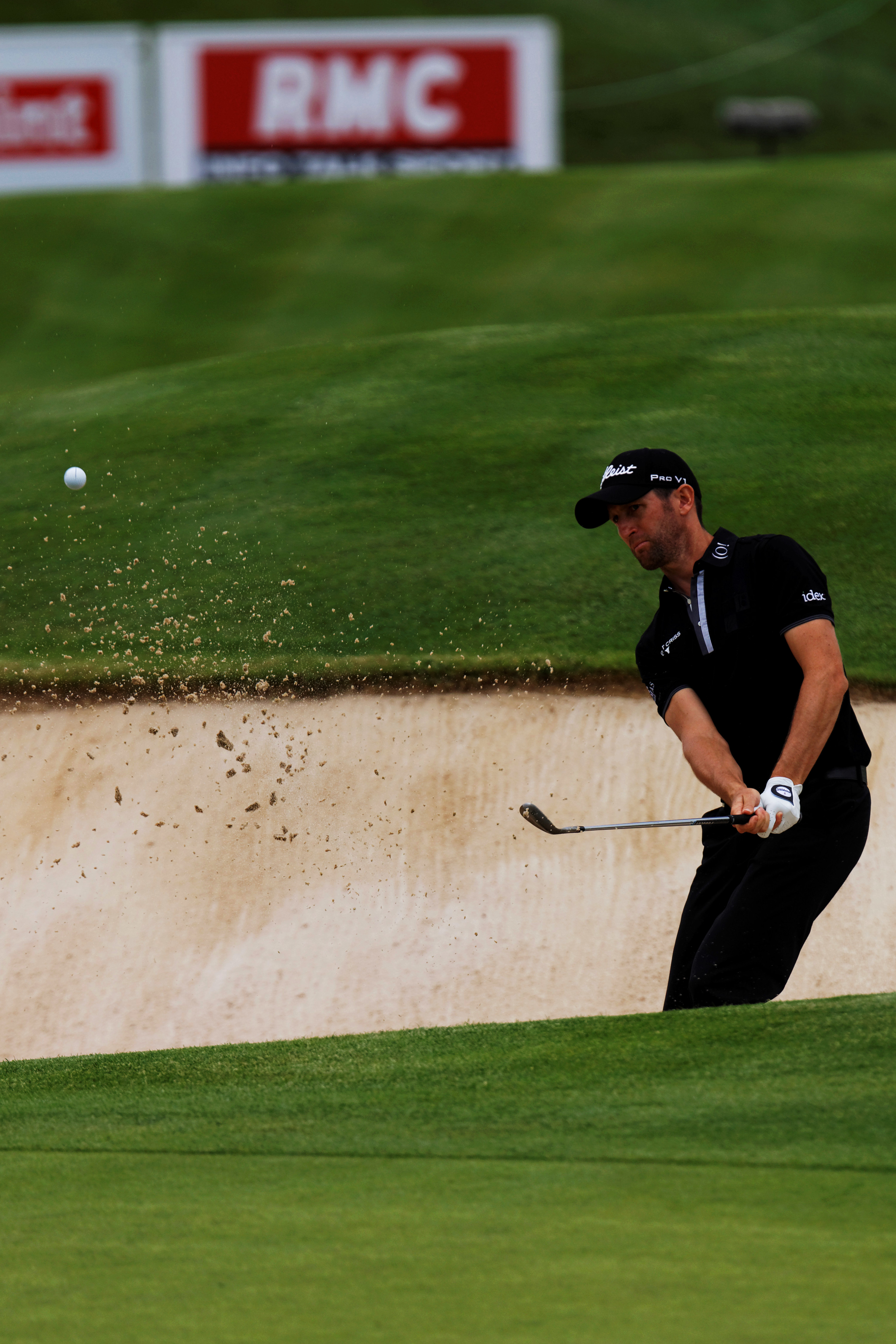 Grégory Bourdy lors du second tour de l'Open de France 2014 - Golf National - Saint-Quentin-en-Yvelines (78) - trou n°18